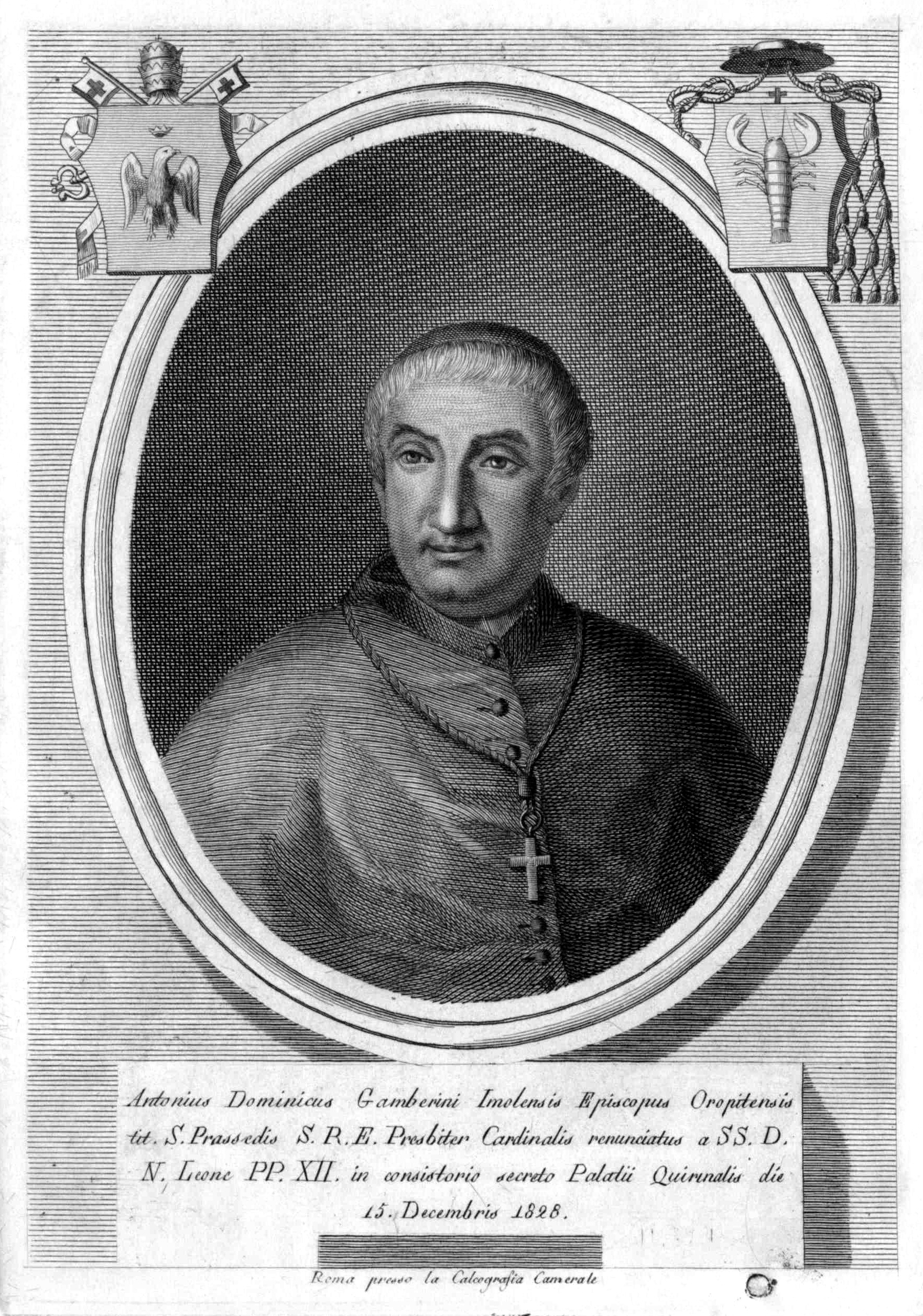 Antonio Domenico Gamberini Wien, Österreichische Nationalbibliothek, Bildarchiv und Grafiksammlung, Inv.-Nr. PORT_00020441_01